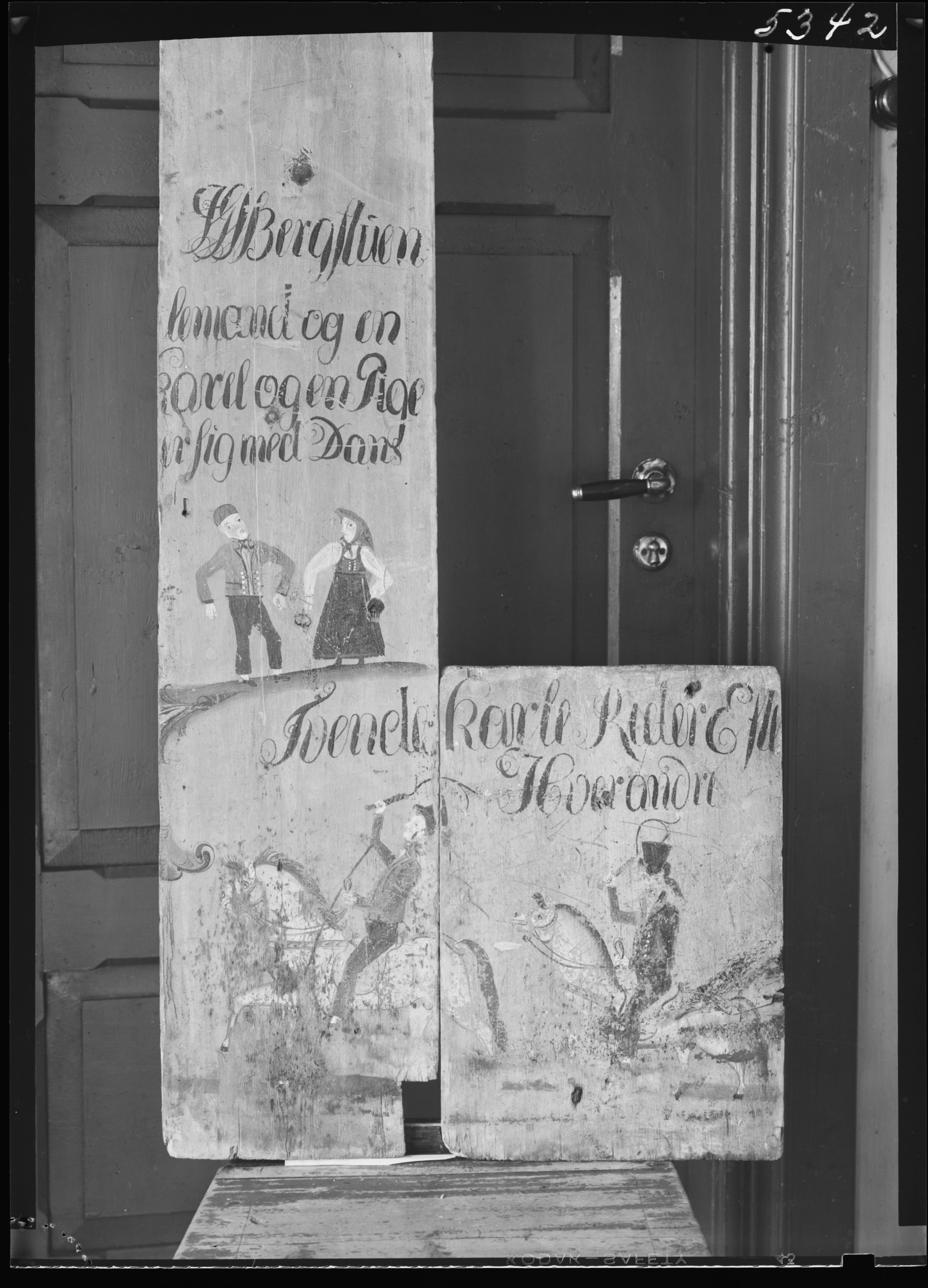 Bildet er hentet fra Nasjonalbibliotekets bildesamling. Anmerkninger til bildet var: Fotograf: ukjent. Påskrift maleri: 1 høgsete tavle malet av J.G.S. Bergstuen, Spellemand og ungKarl og en pike fornøier seg med Dans. Tvende Karle rider efter hverandre Bondal,Brekke, Hjartdal, Telemark